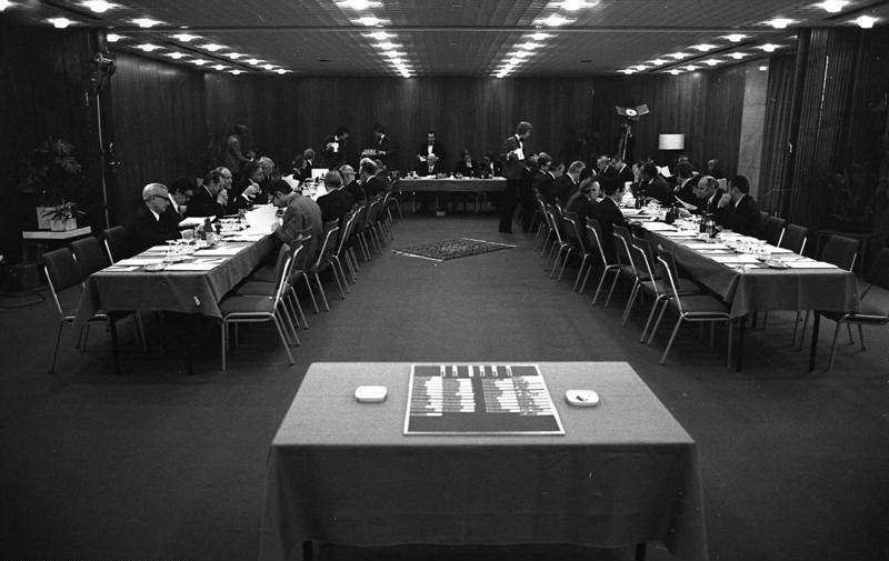 Frau Mildred Scheel nimmt teil an der Konstituierung des Vereins Deutsche Krebshilfe e. V. im Steigenberger Hotel, Bonn